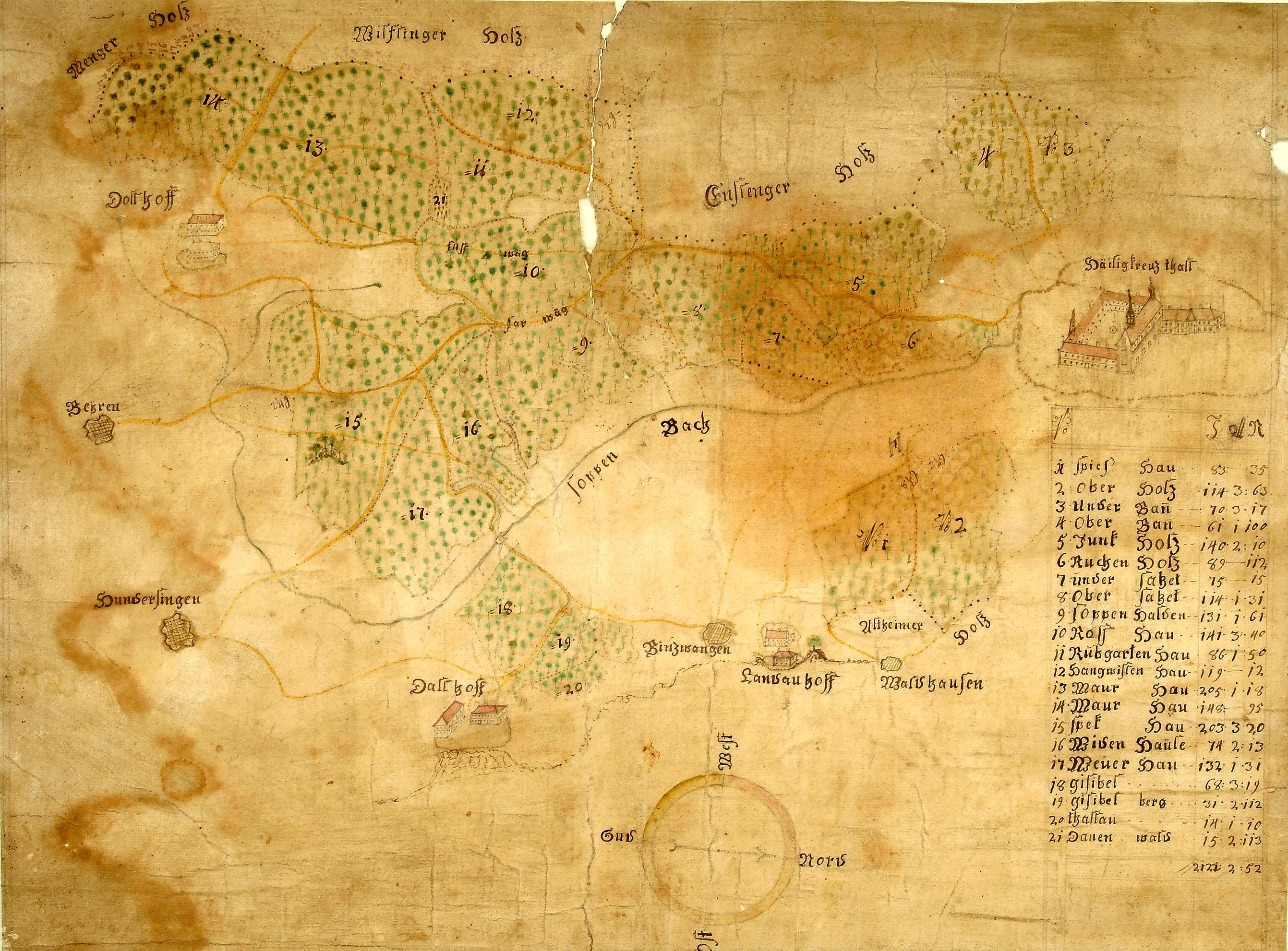 LAndkarte mit die dem Kloster Heiligkreuztal gehörigen Wälder beiderseits des Soppenbachs, ca. 1700